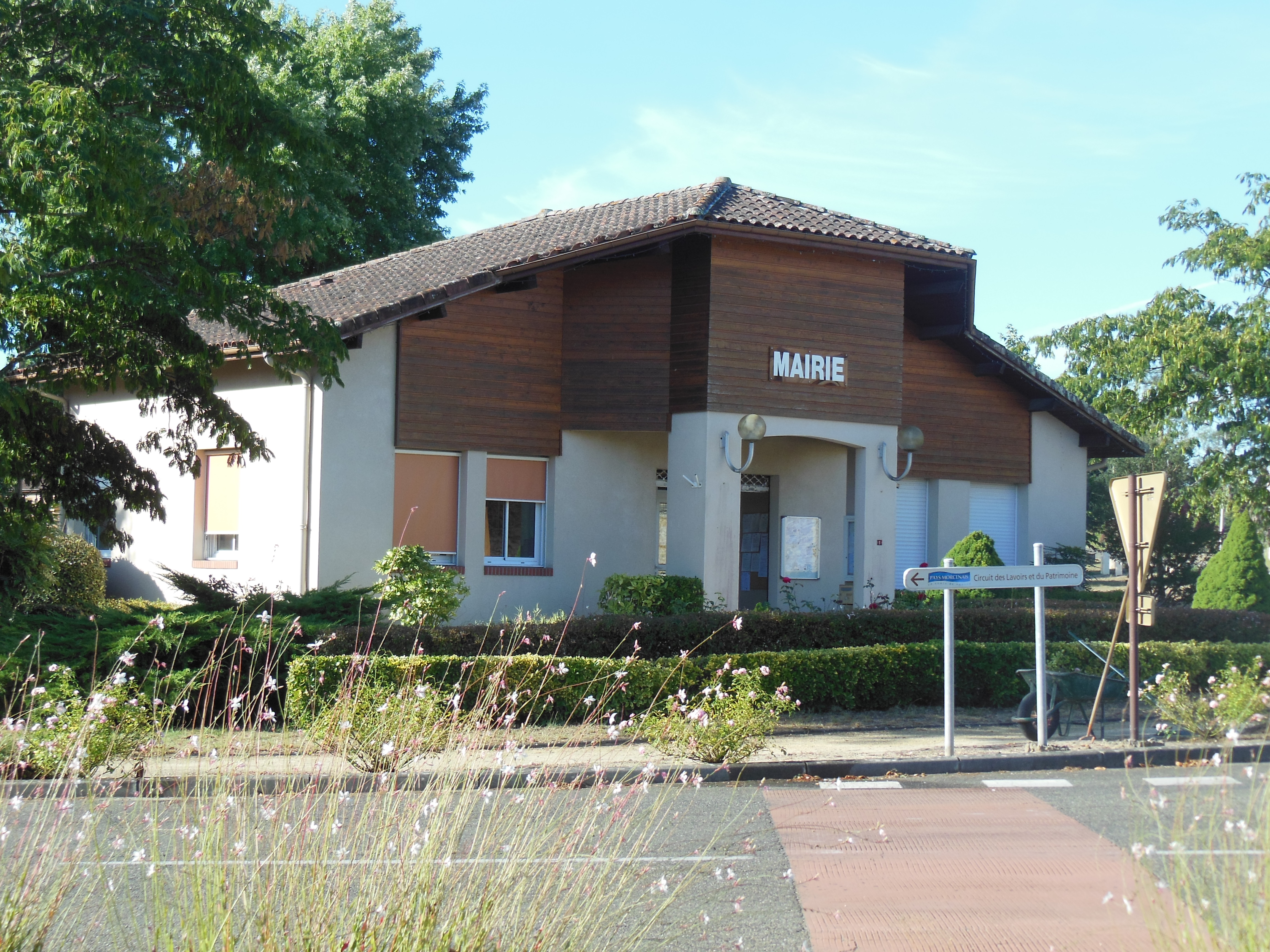 Mairie de Villenave, dans le département français des Landes